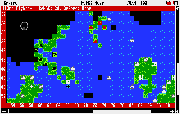 Screenshot of Empire for Amiga